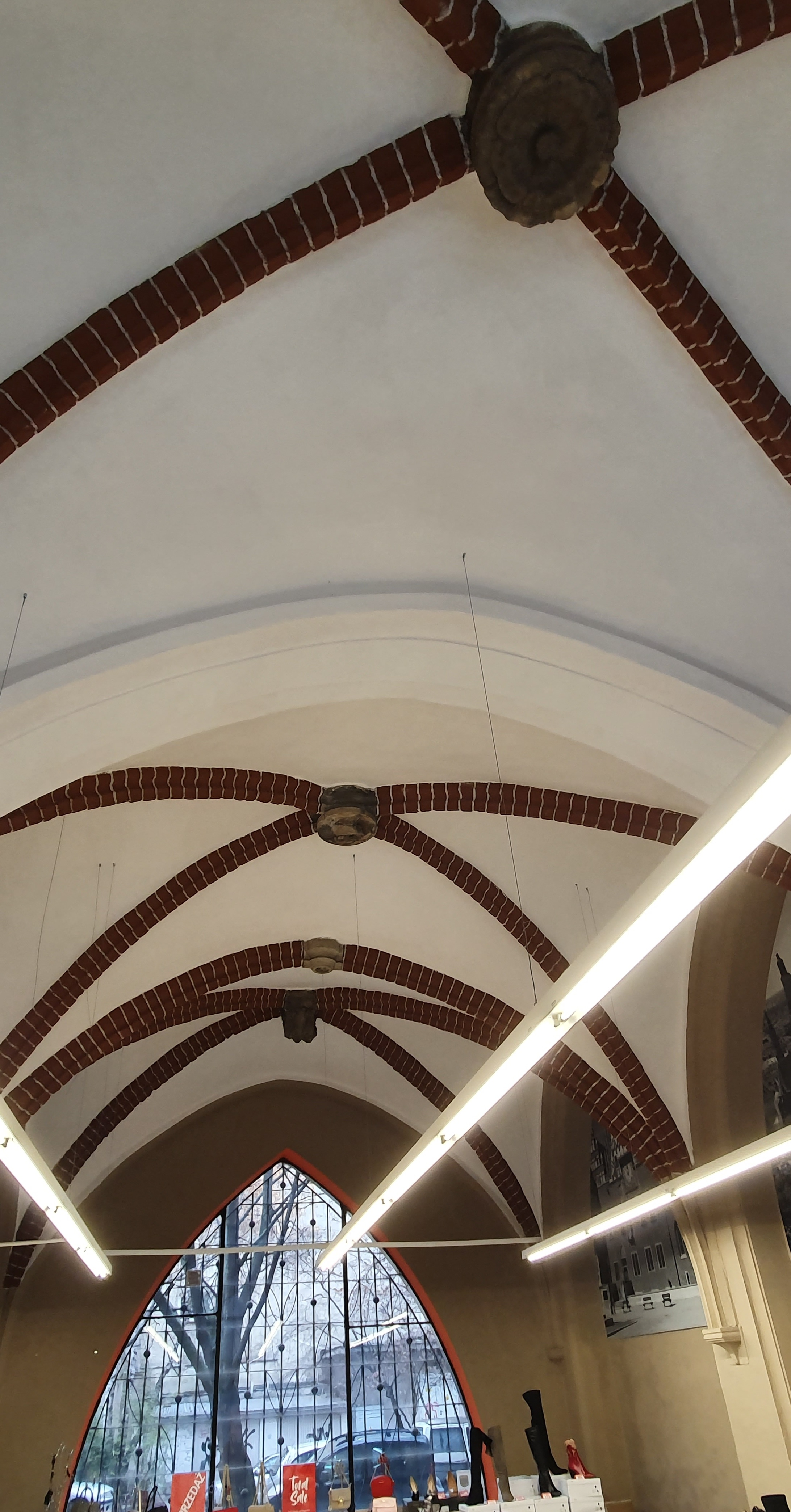 Kamienica przy ulicy Wita Stwosza 56 we Wrocławiu , parter sklepienie krzyżowo-żebrowe z rzeźbionymi kamiennymi zwornikami